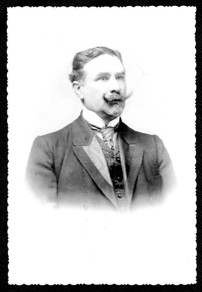 Colombian Scientist. XIX-XX Centuries.